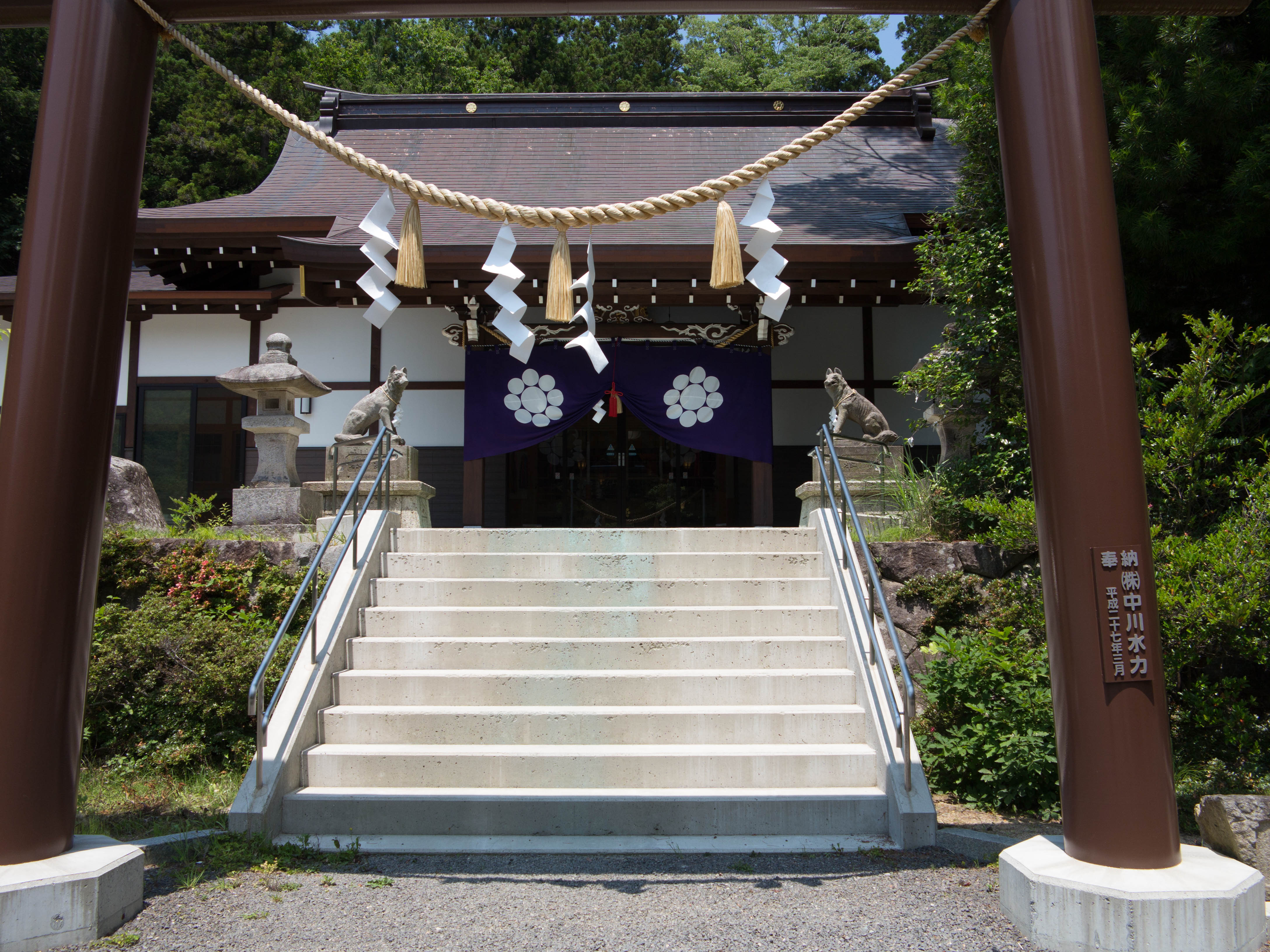 再建後の山津見神社拝殿